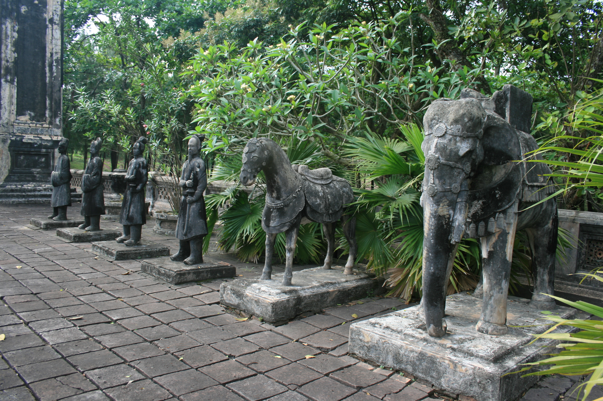 Tomb of DongKhanh (Tượng voi, ngựa, bá quan đắp bằng vôi, gạch với dáng cao nhưng gầy)